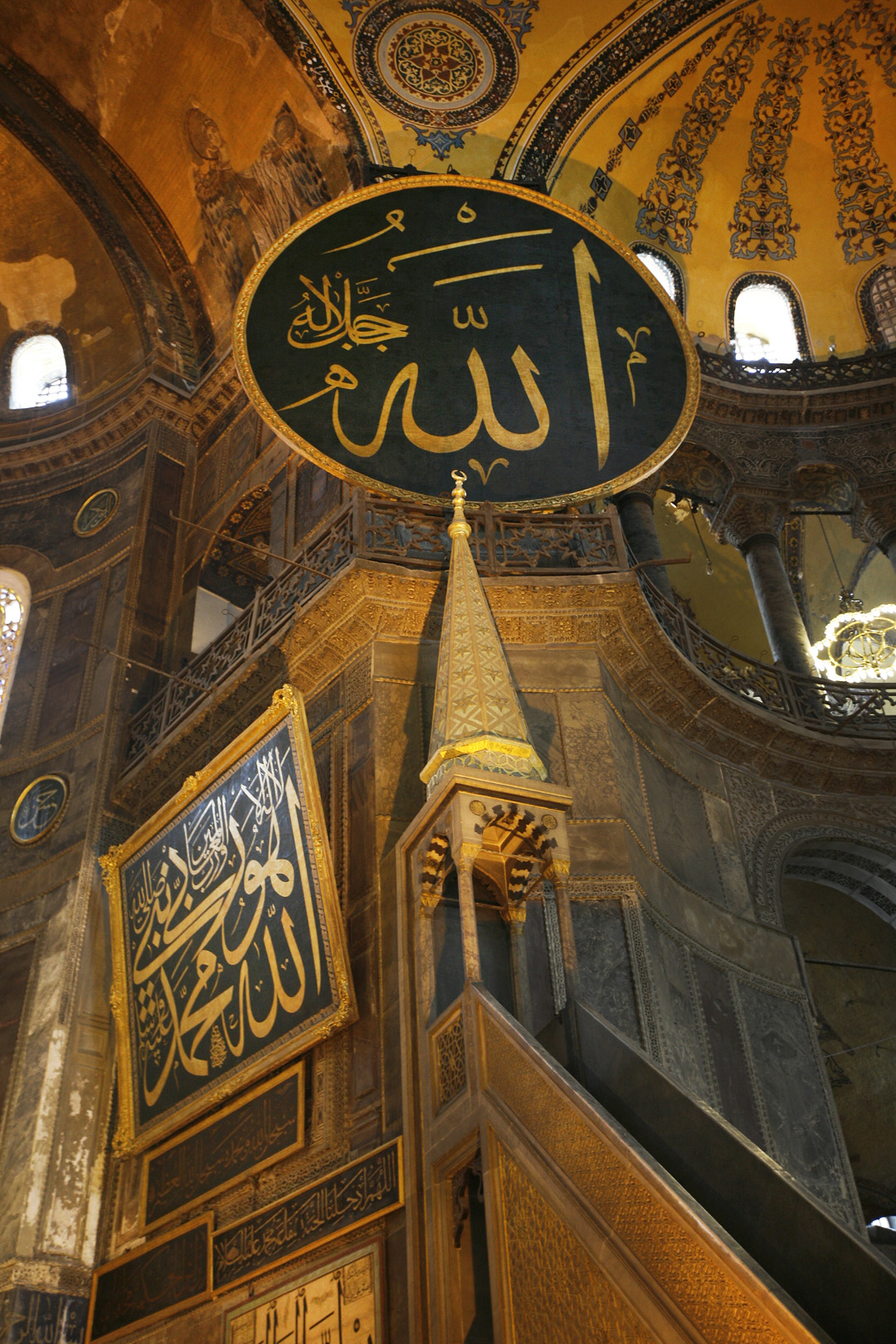 Istanbul 027